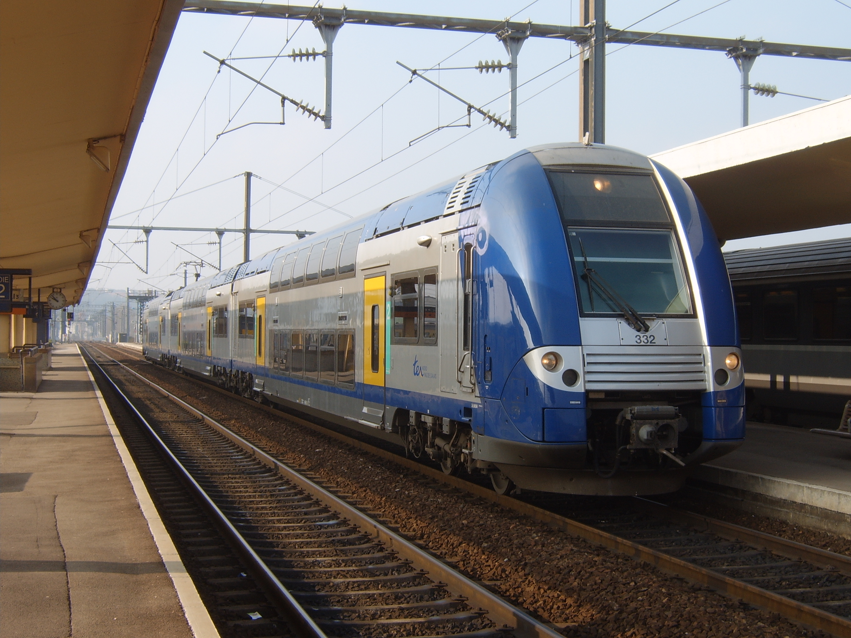 TER Nord pas de Calais double deck EMU set Z24564 seen at Boulogne-Ville on 18 March 2006.